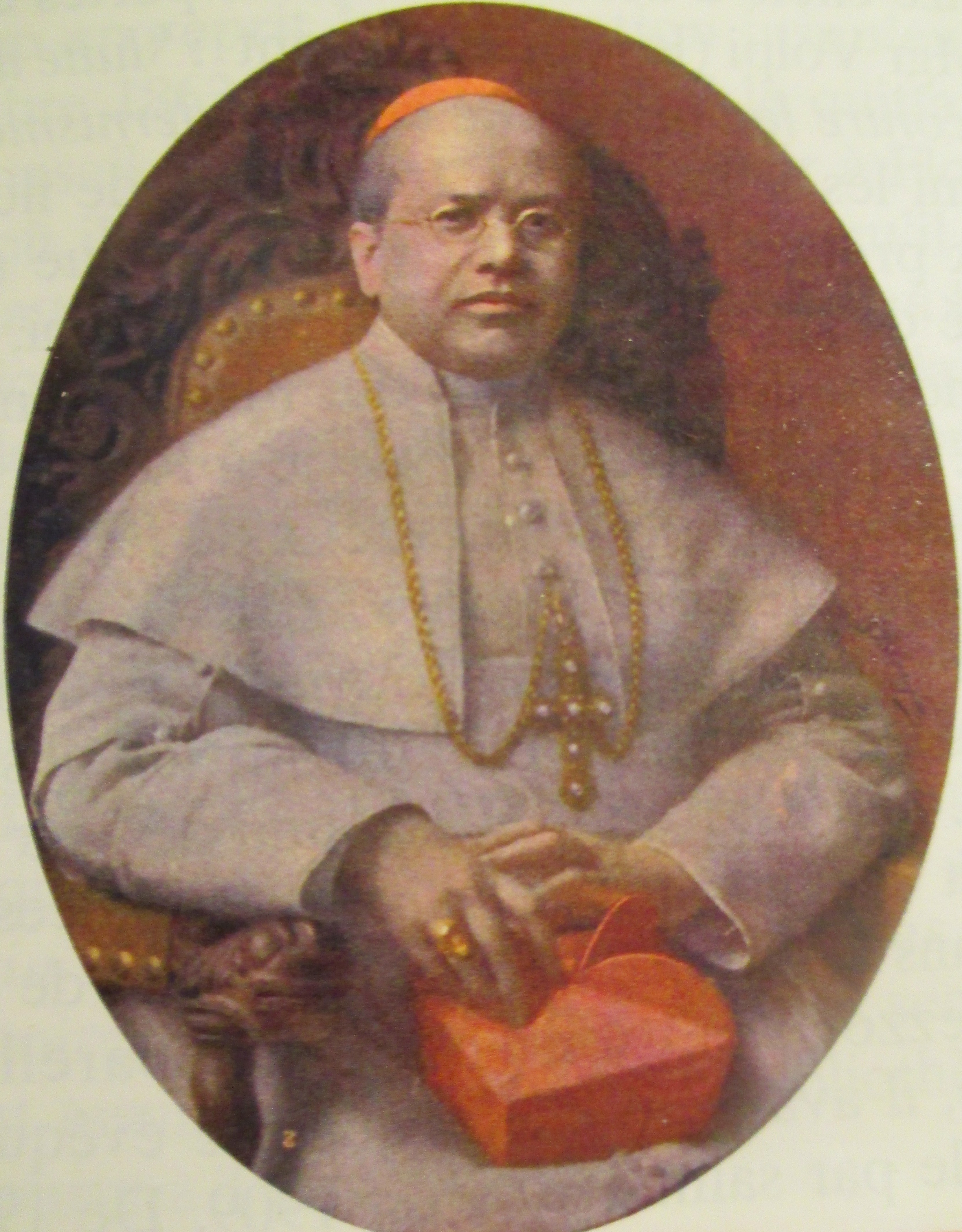 Cardinal T. P. Boggiani, de l'ordre des dominicains (1863-1942)